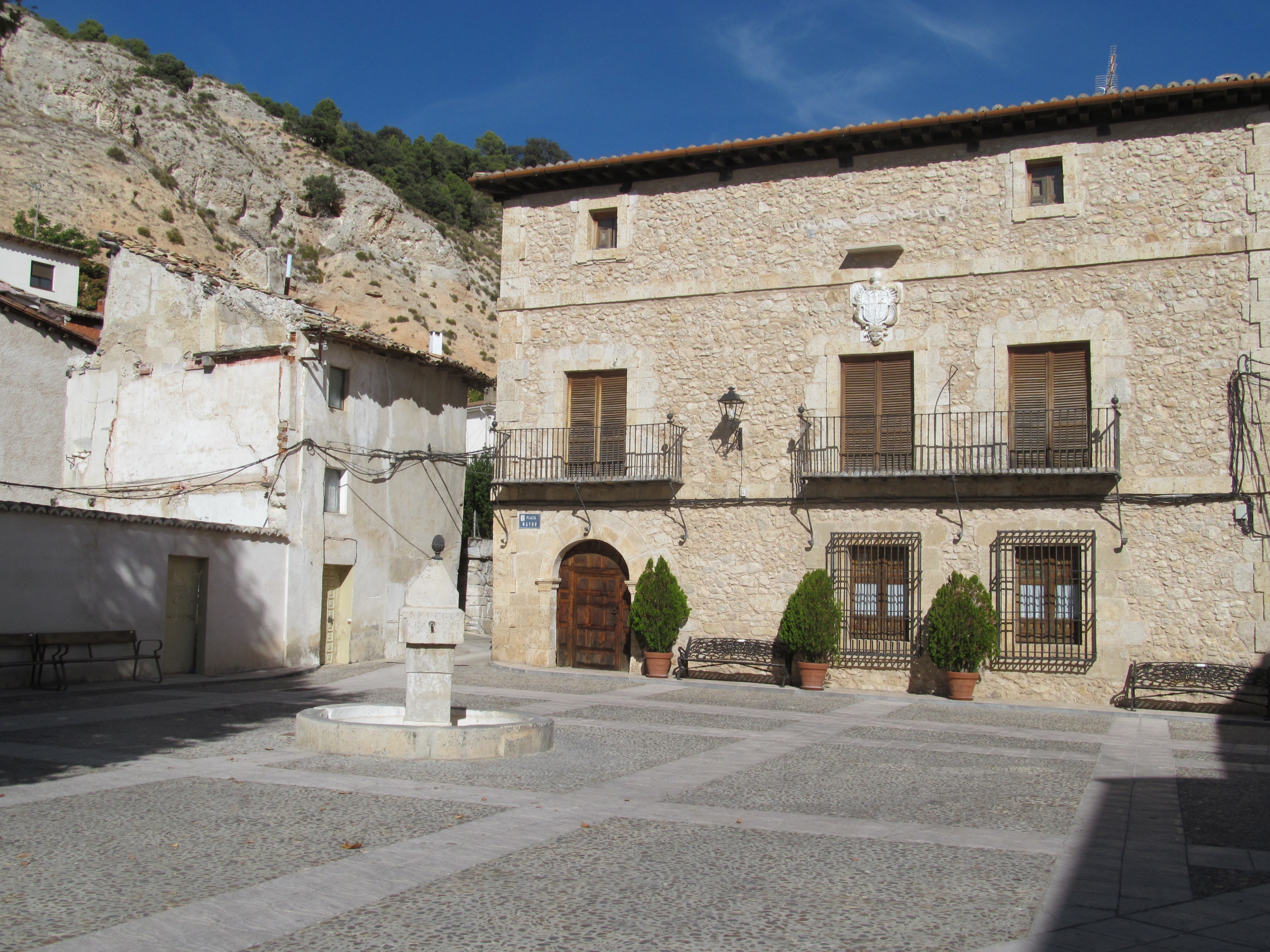 Chillarón del Rey - Casona antígua del siglo XVI que perteneció al Cabildo de la Catedral de Cuenca, con escudo en la fachada. En la plaza Mayor.